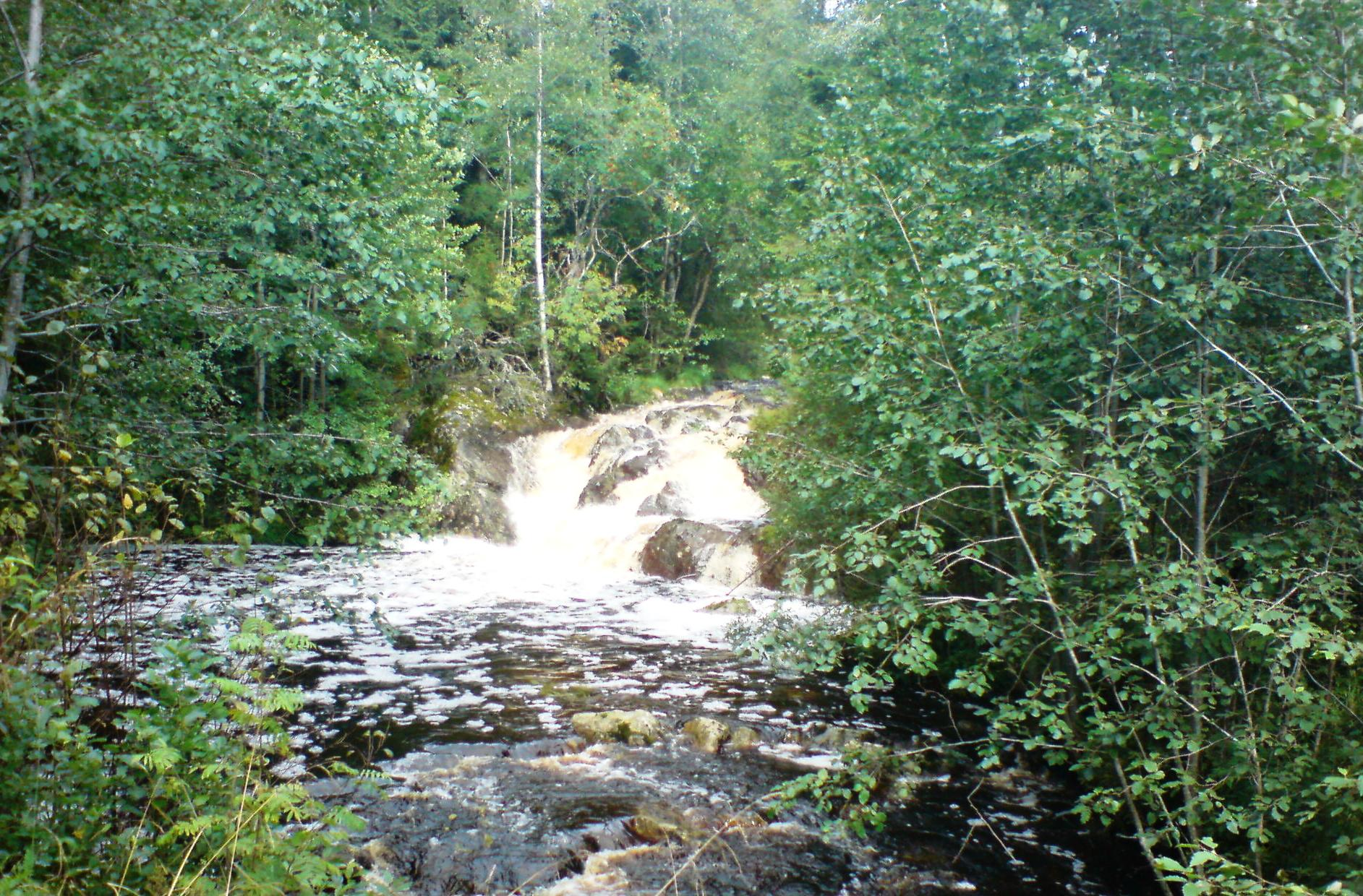 Kvisla i Aurskog-Høland kommune.